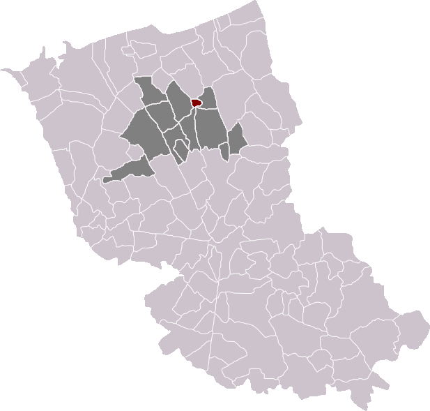 Locatie gemeente Sint-Winoksbergen in arrondissement Duinkerke. Zelfgemaakt. Location of Bergues municipality in the arrondissement of Dunkirk. Self made. Localisation de la commune de Bergues dans l'arrondissement de Dunkerque. Fait moi-même.